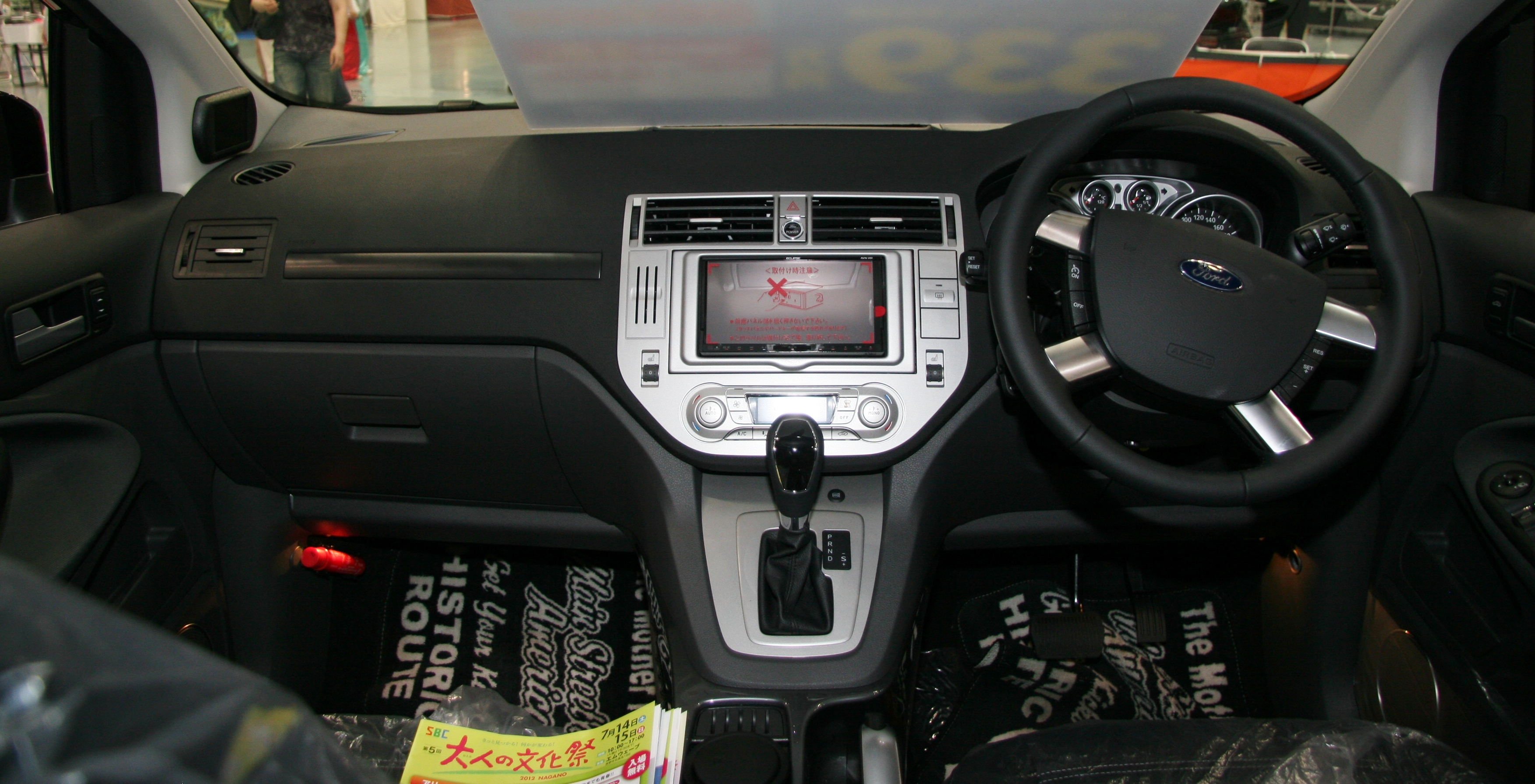 Ford Kuga